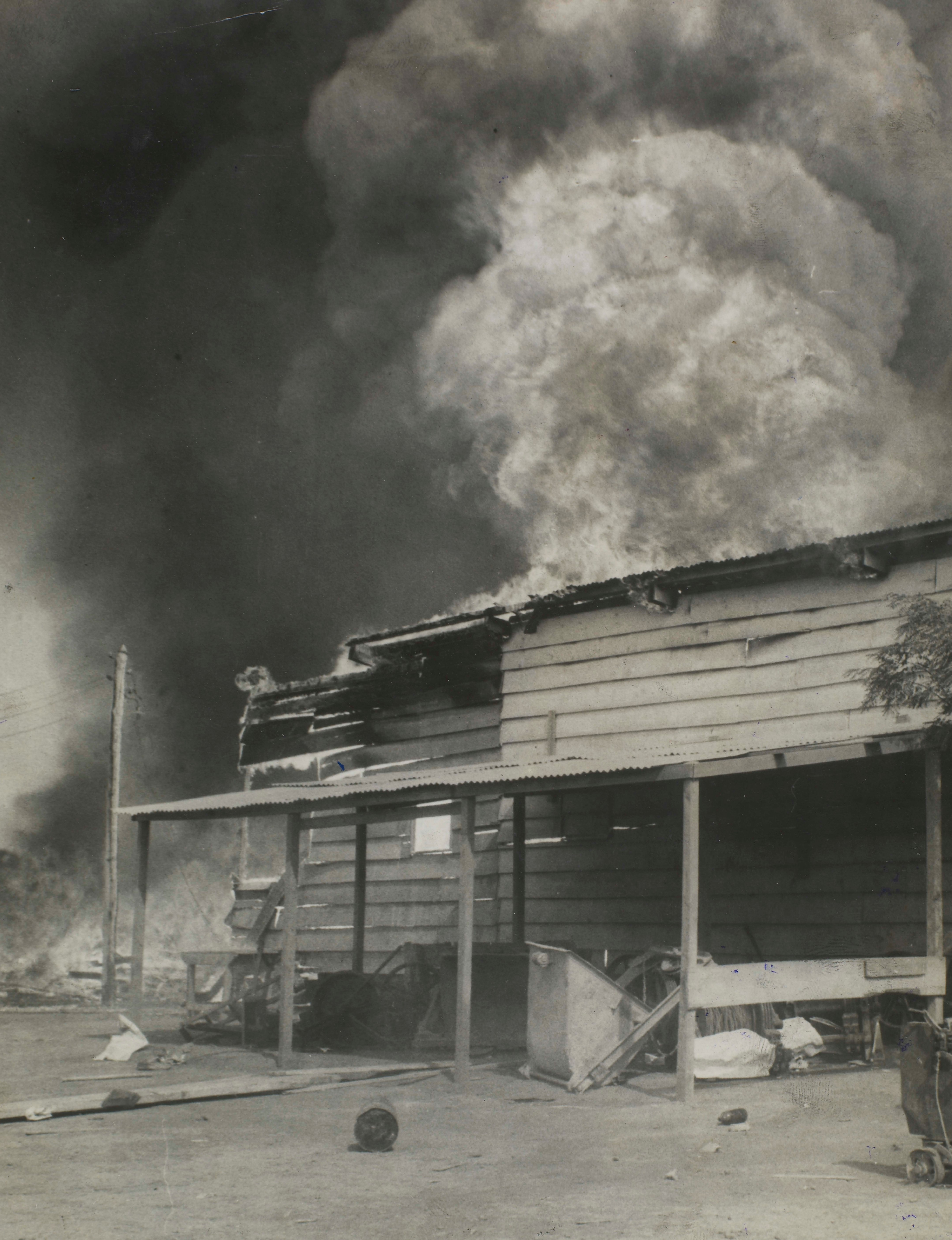 Fotografia do Fundo Correio da Manhã, sob a guarda do Arquivo Nacional.